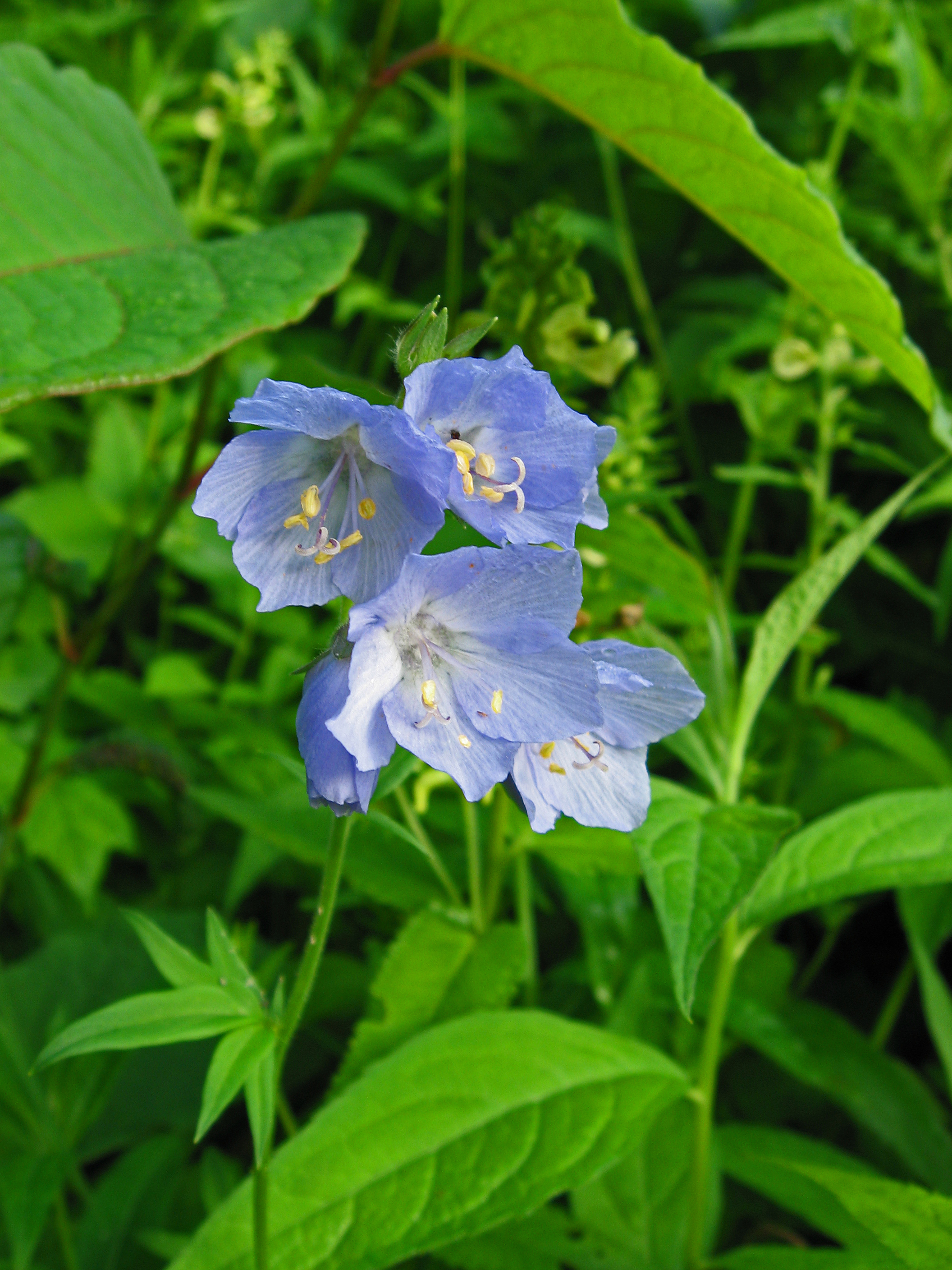 ミヤマハナシノブ (学名：Polemonium caeruleum var. nipponicum)